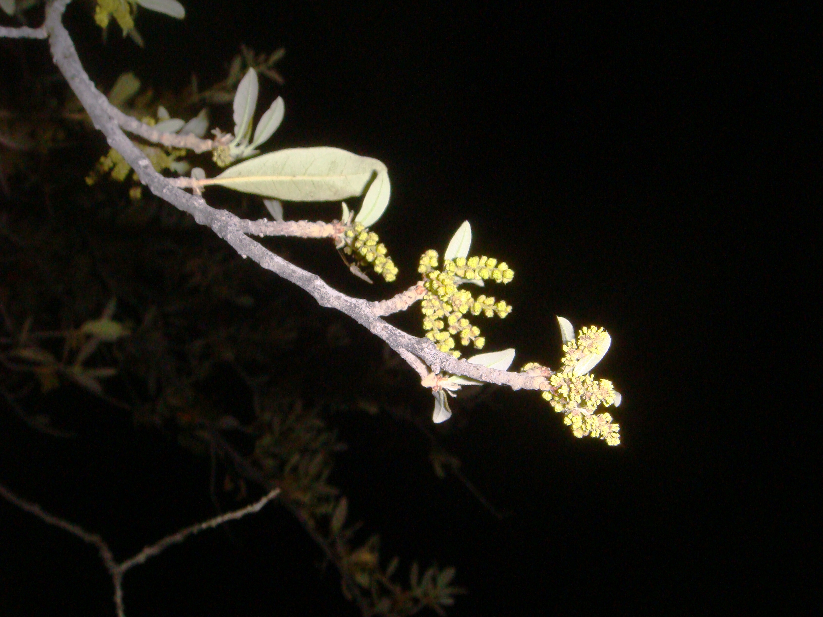 Quercus virginiana, cultivated, Arizona State University, Tempe, Arizona